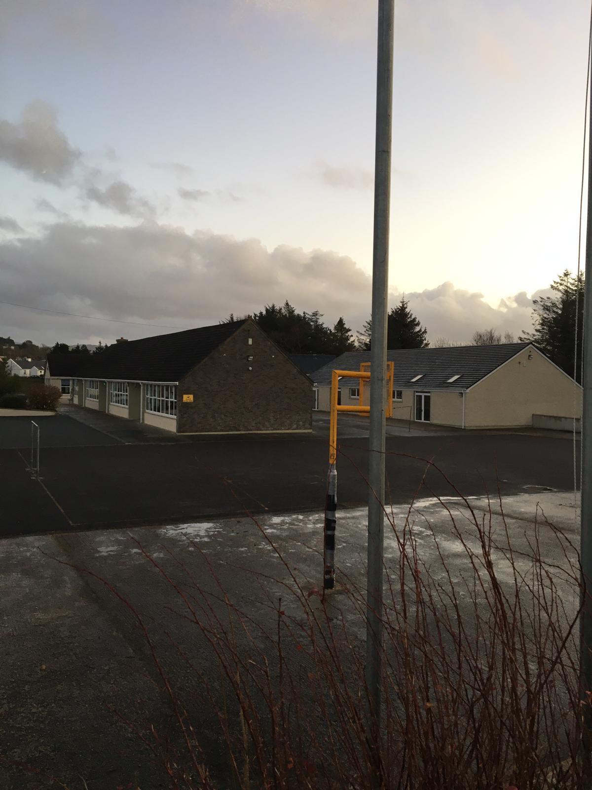 An t-aon bhunscoil atá suite sa bhaile fearainn, Scoil Mhuire, Na Doirí Beaga.